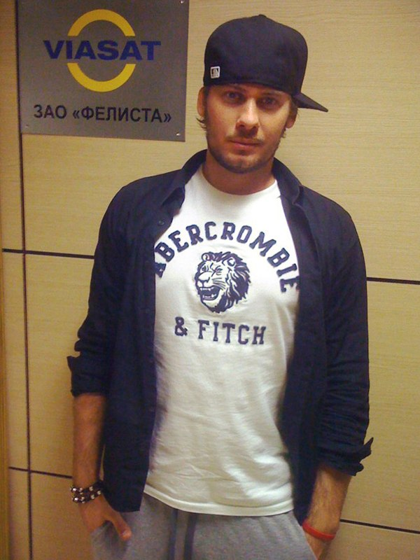 Андрей Батычко (Батт) в офисе телеканала Viasat Sport (Виасат Спорт) после трансляции матча НБА между командами New York Knicks и Los Angeles Lakers.